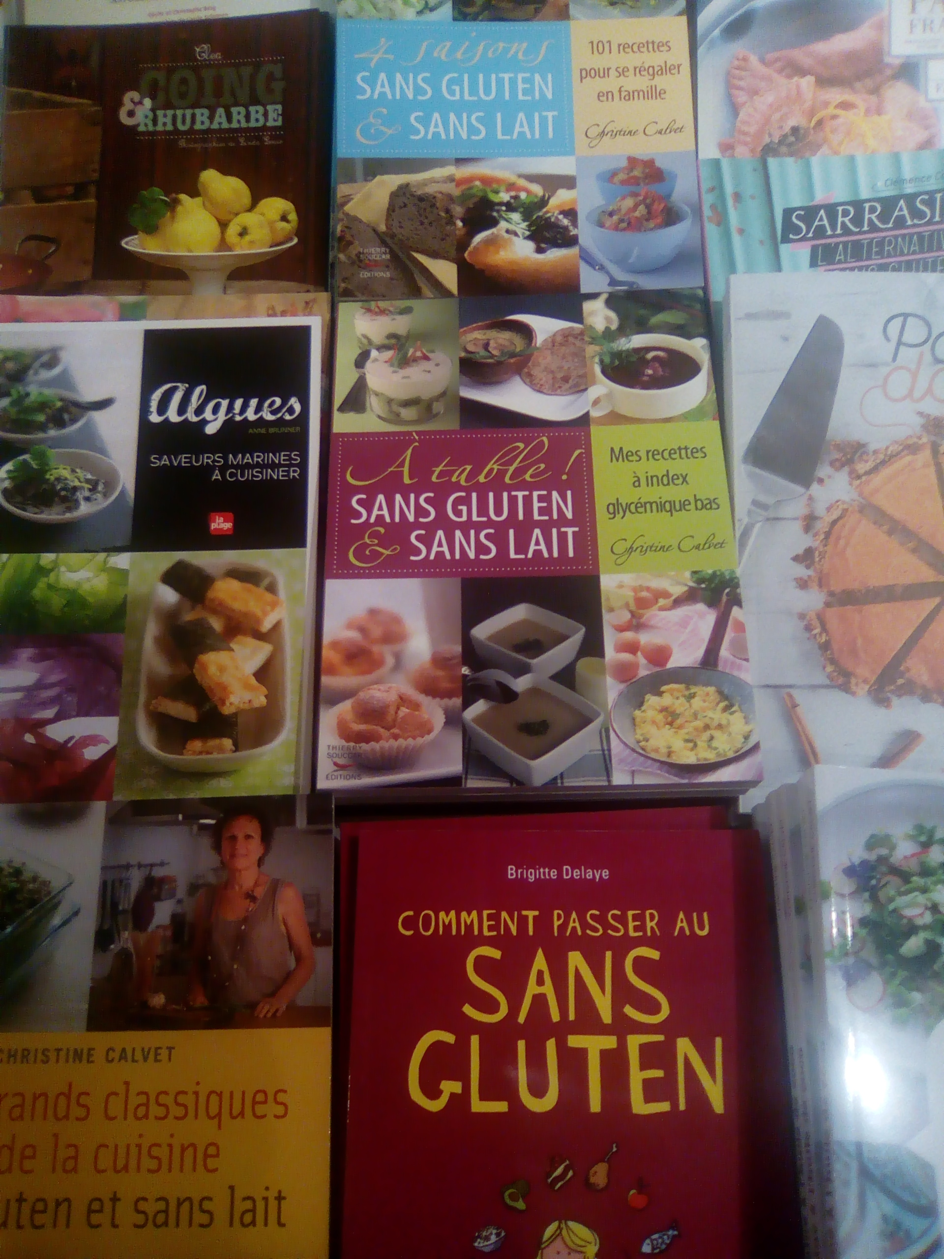 Salon Marjolaine au Parc floral de Paris.